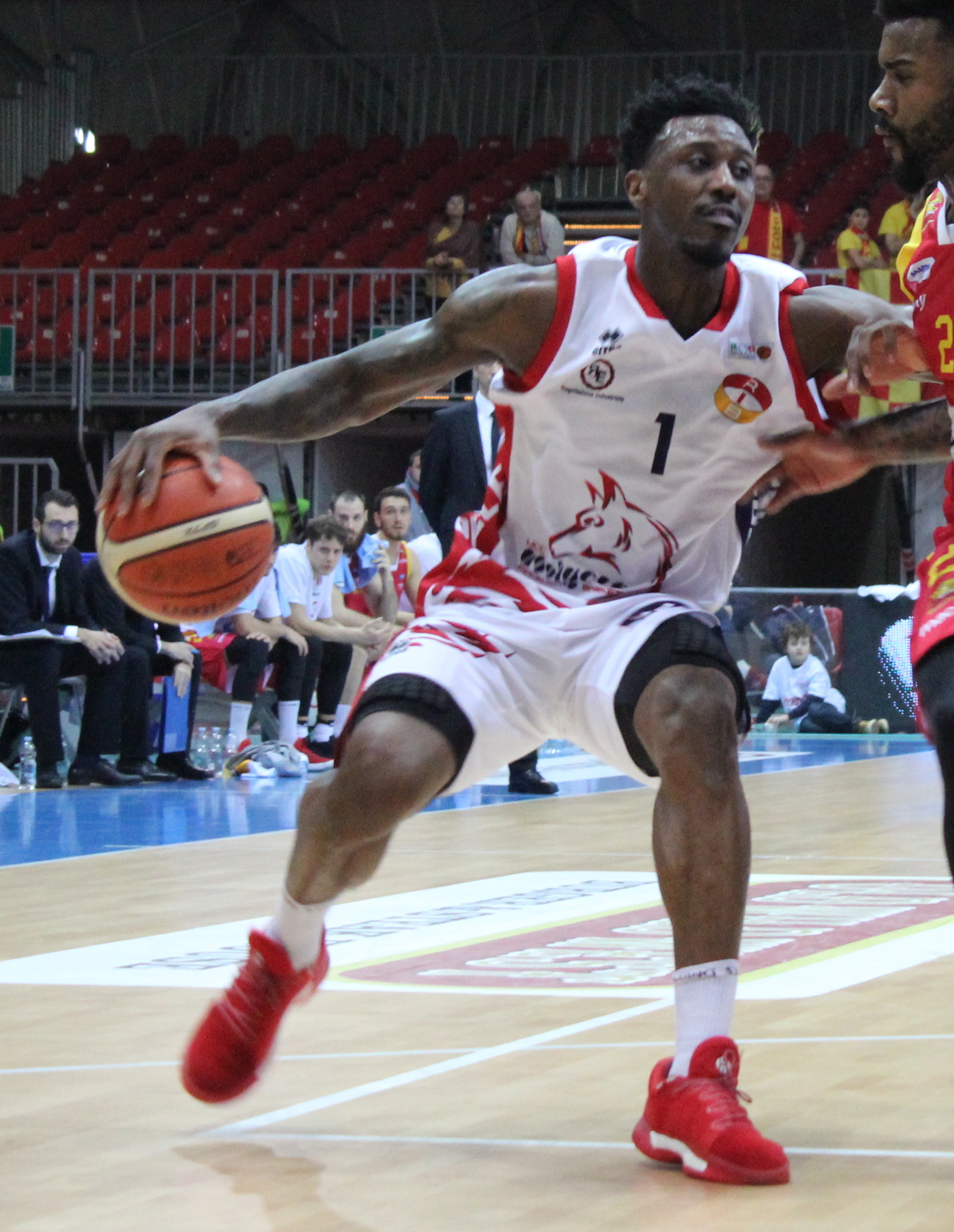 Carlton Guyton in azione con la maglia dell'U.C.C. Piacenza